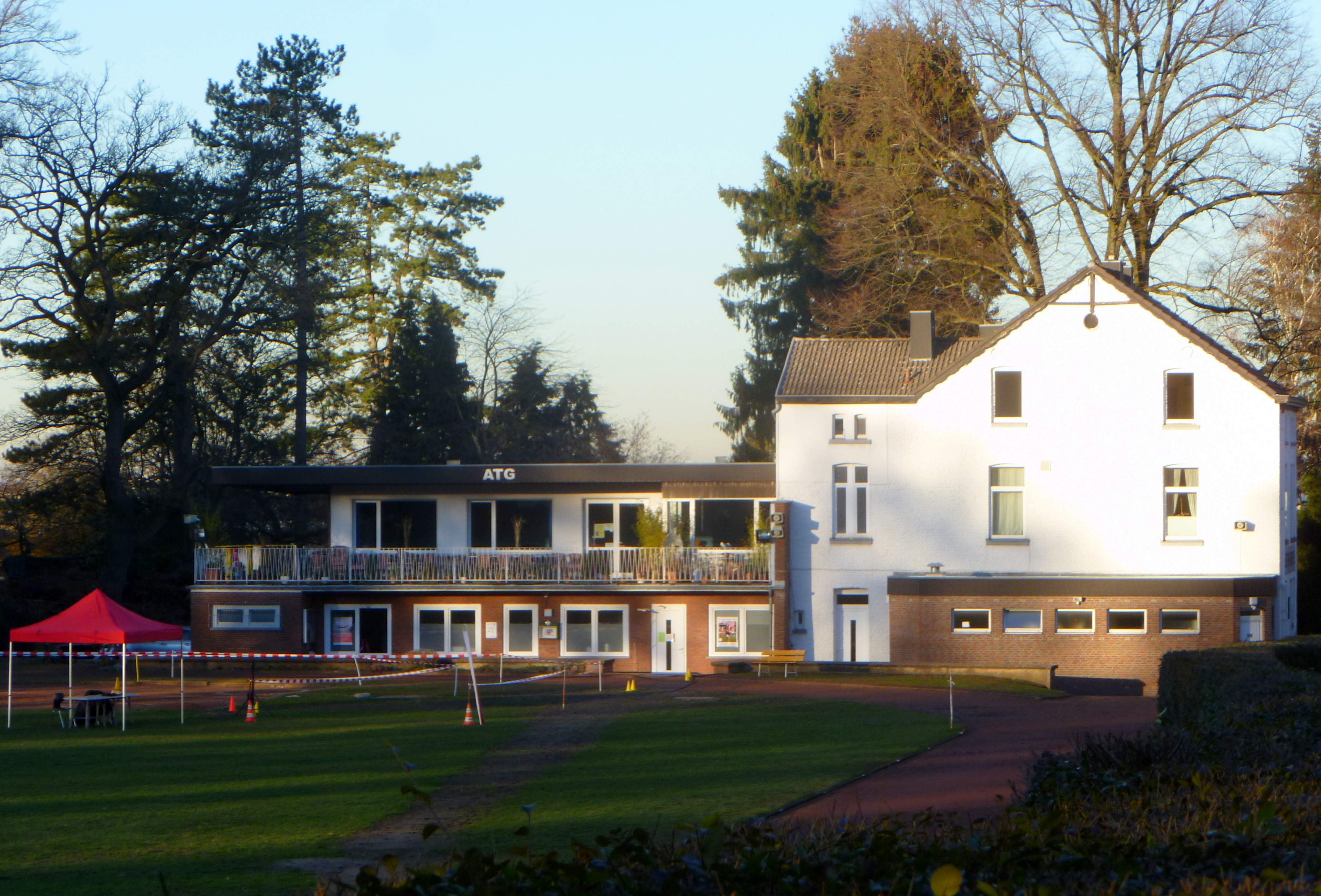 ATG-Sportlerheim am ATG-Stadion in Aachen-Diepenbenden, Am Chorusberg